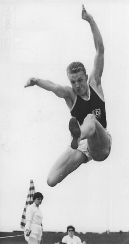 Klaus Beer Zentralbild Kohls 23.6.1962 Berliner Leichtathletikmeisterschaften 1962 Die Berliner Titelkämpfer in der Leichtathletik werden am 23. und 24.6.1962 im Walter-Ulbricht-Stadion durchgeführt. UBz: Berliner Meister im Weitsprung wurde Klaus Beer (SC Dynamo Berlin)